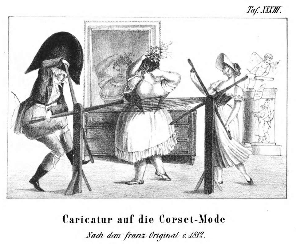 Tafel aus Karl Friedrich Flögel, Friedrich Wilhelm Ebeling (Bearb.): "Geschichte des Grotesk-Komischen", 1862; Flögel1862 33 Caricatur auf die Corset-Mode.jpg